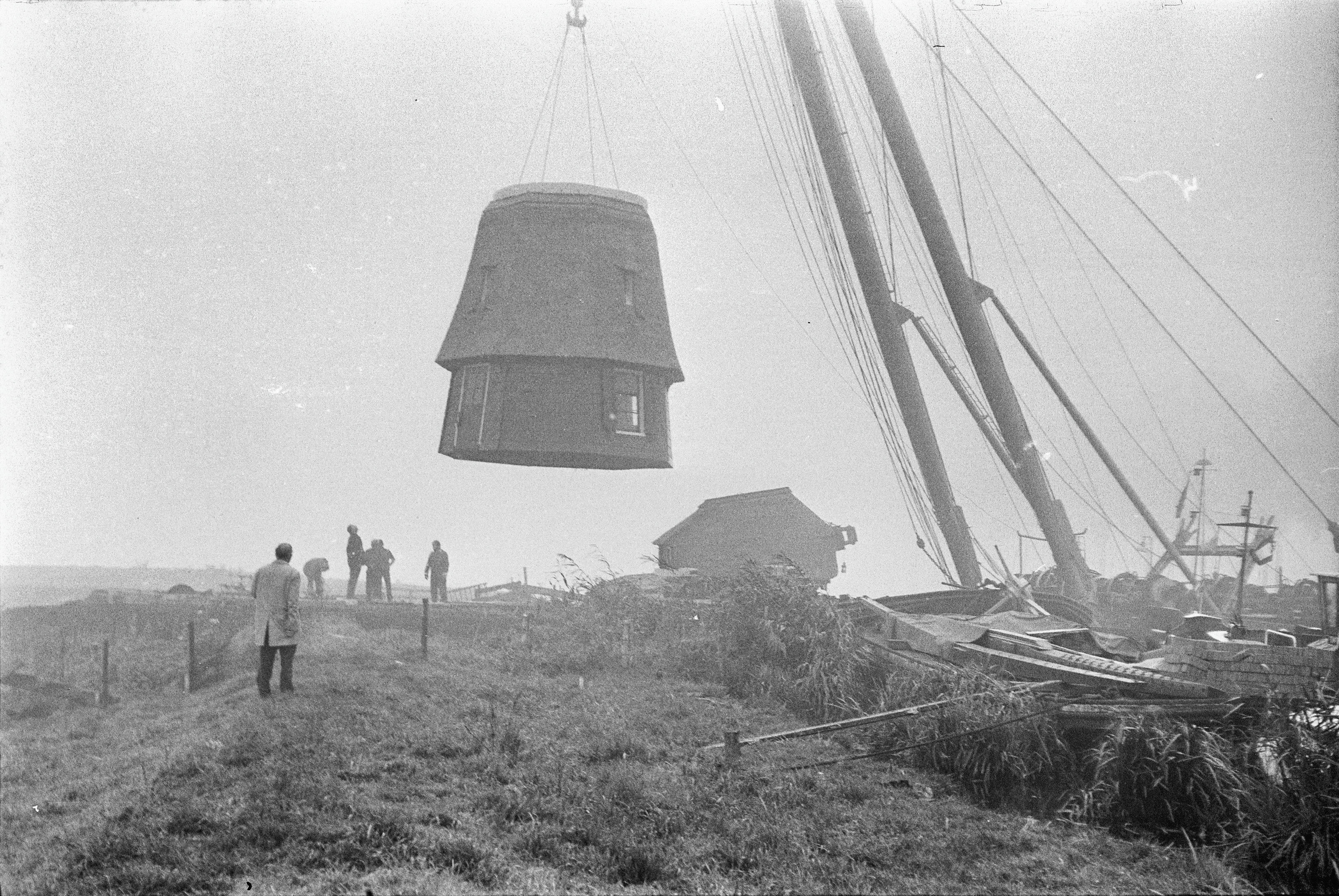 Molen van de Verenigde Grote en Kleine Polders: Weer op de plaats zetten van de gerestaureerde molen